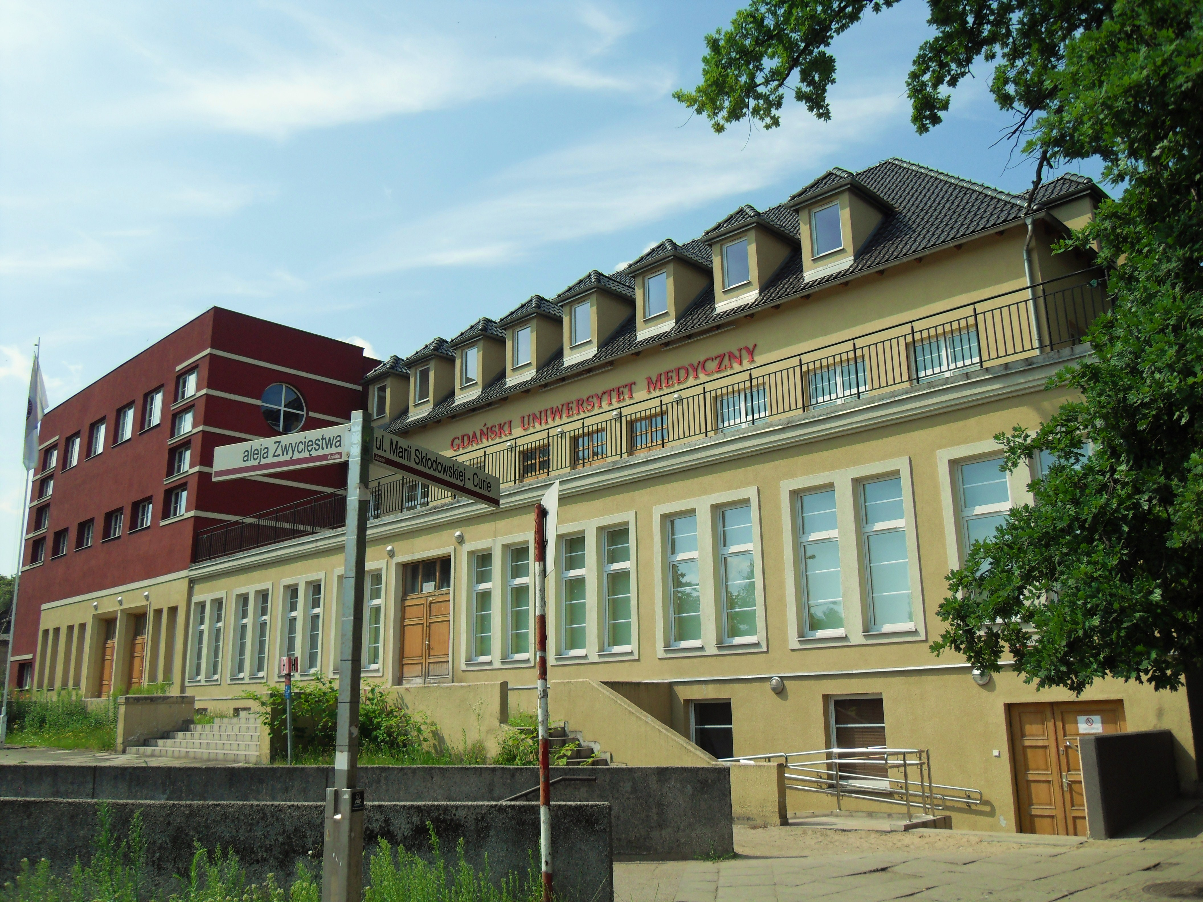 Gdański Uniwersytet Medyczny. Budynek Atheneum Gedanense Novum, al. Zwycięstwa 41/42 Gdańsk Aniołki.